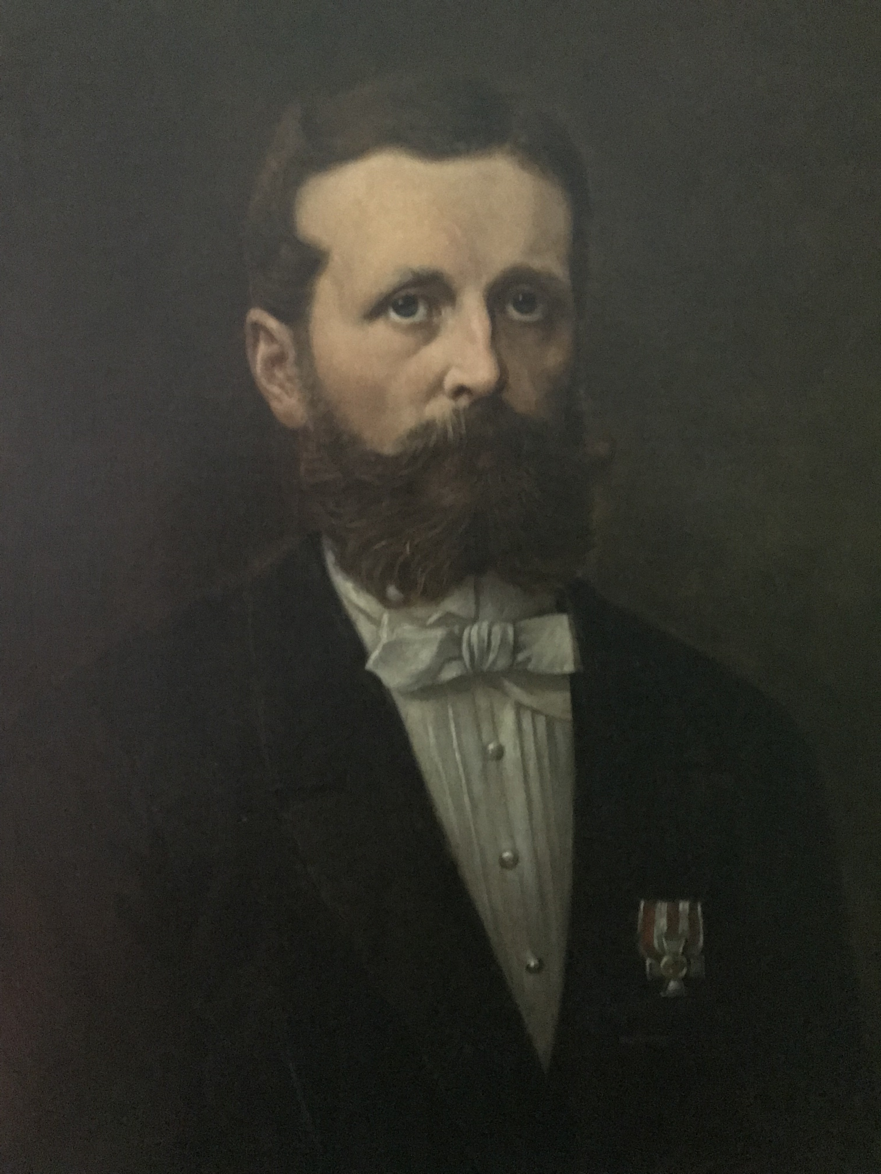 Porträt von Amtsrat Julius von Bandel, Fideikommißherr auf Dröbel/Anhalt und Pächter der Domäne Calenberg; Ölgemälde von Friedrich Kaulbach, signiert, 1898